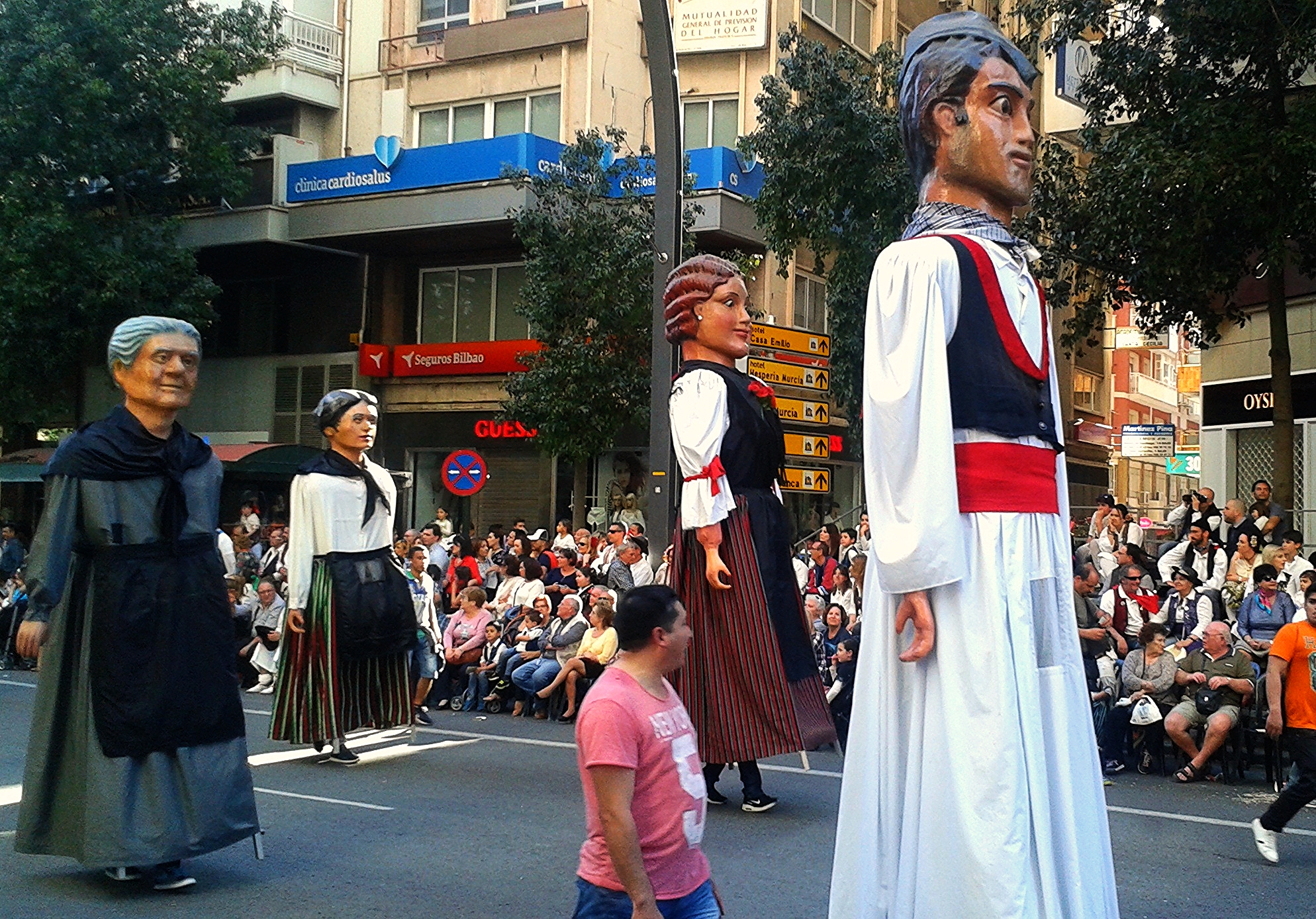 Gigantes y cabezudos en el Bando de la Huerta (Murcia)